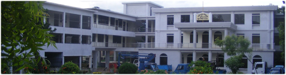 ফরিদপুর পৌরসভা ভবন এর চিত্র